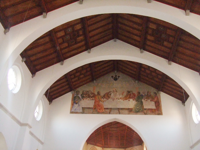 Pfarrkirche St. Nikolaus, Pfahlheim, Stadt Ellwangen (Jagst), erbaut 1891 von Joseph Cades Chorbogenfresko mit dem letzten Abendmahl